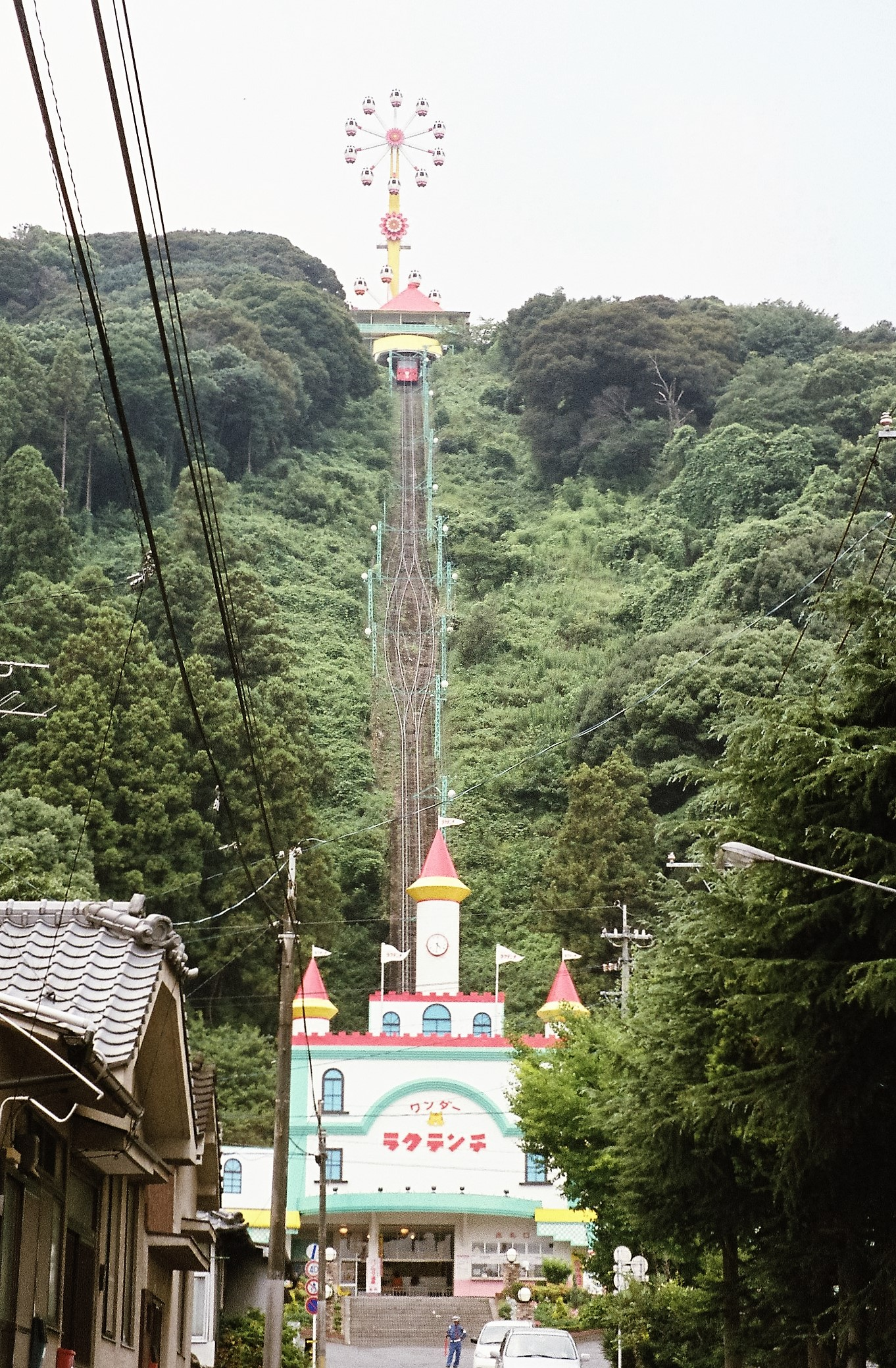 別府ワンダーラクテンチ時代の別府ラクテンチケーブル線全景（2004年8月）